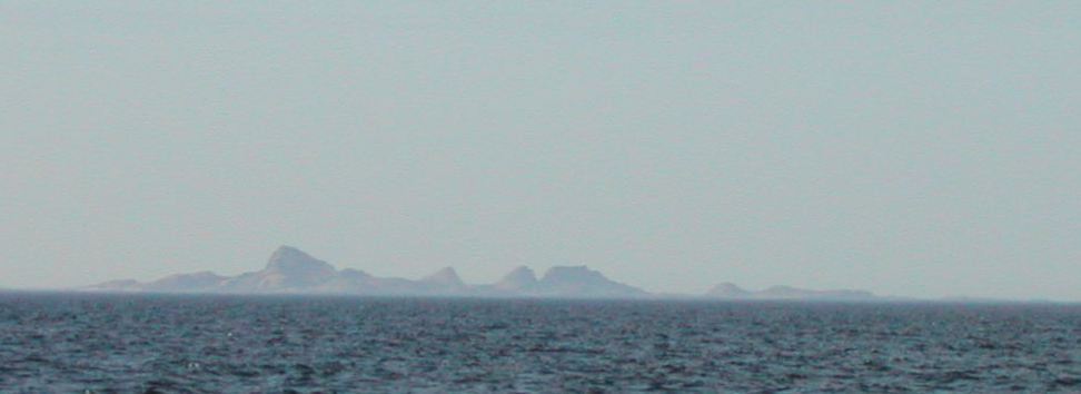 Dørvær i Træna